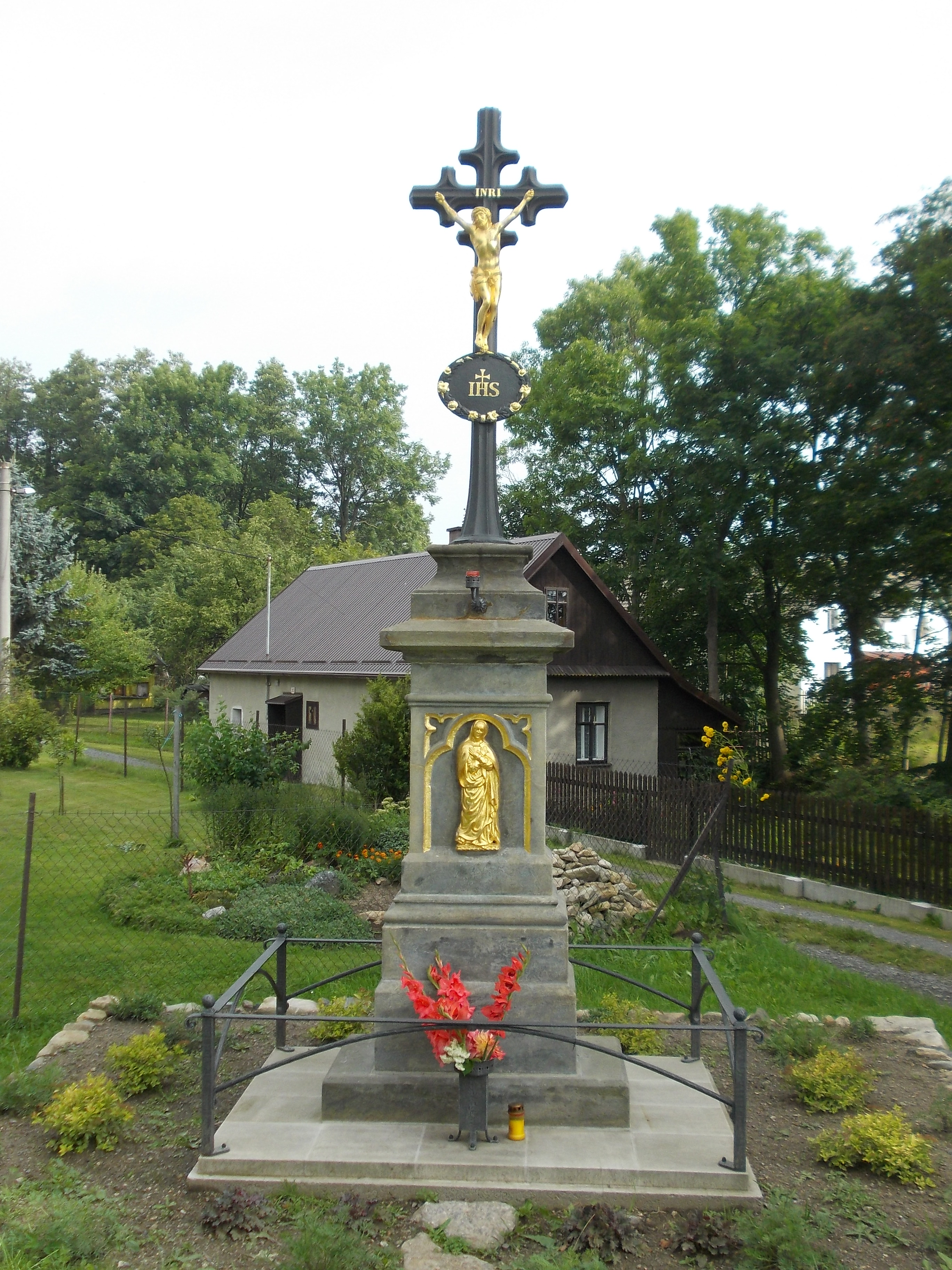 Oldřiš - krucifix